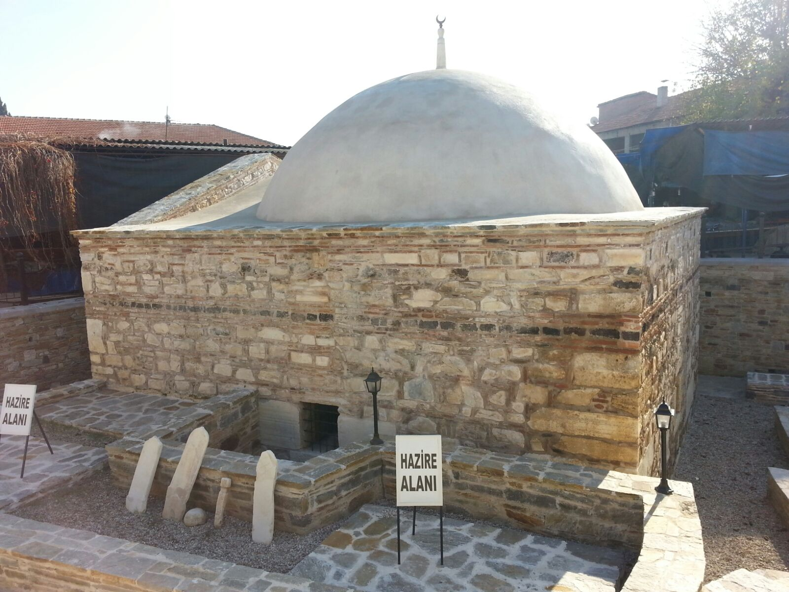 germiyanoğlu süleyman şah türbesi-kula